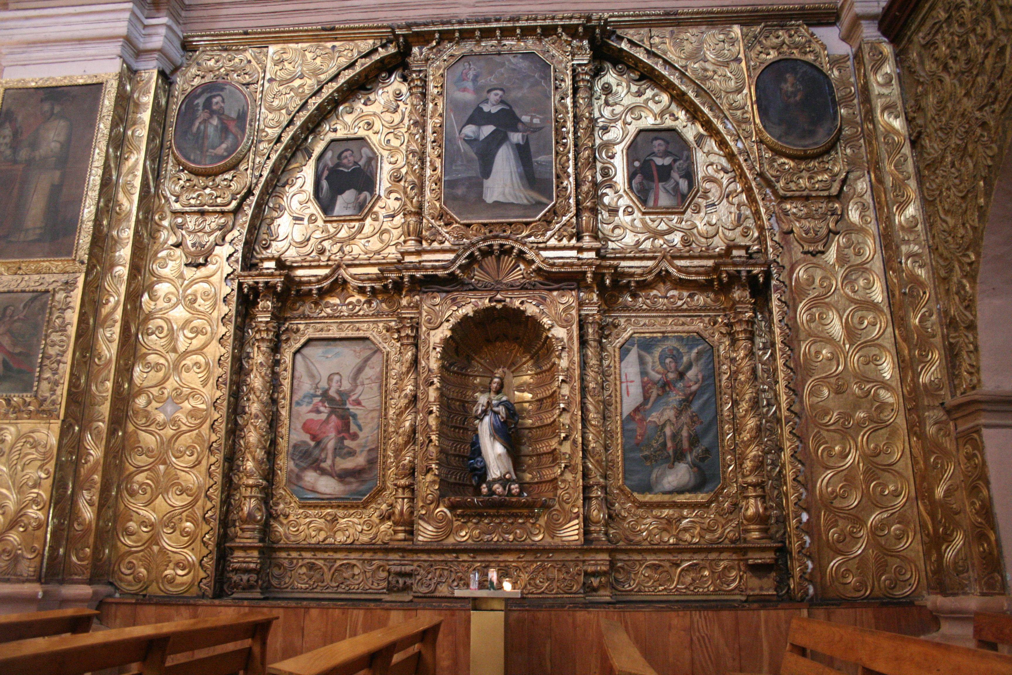 chiesa san cristobal (DC)